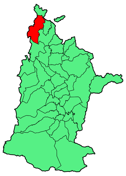 Aipaturiko udalerriaren kokapena Zuberoan